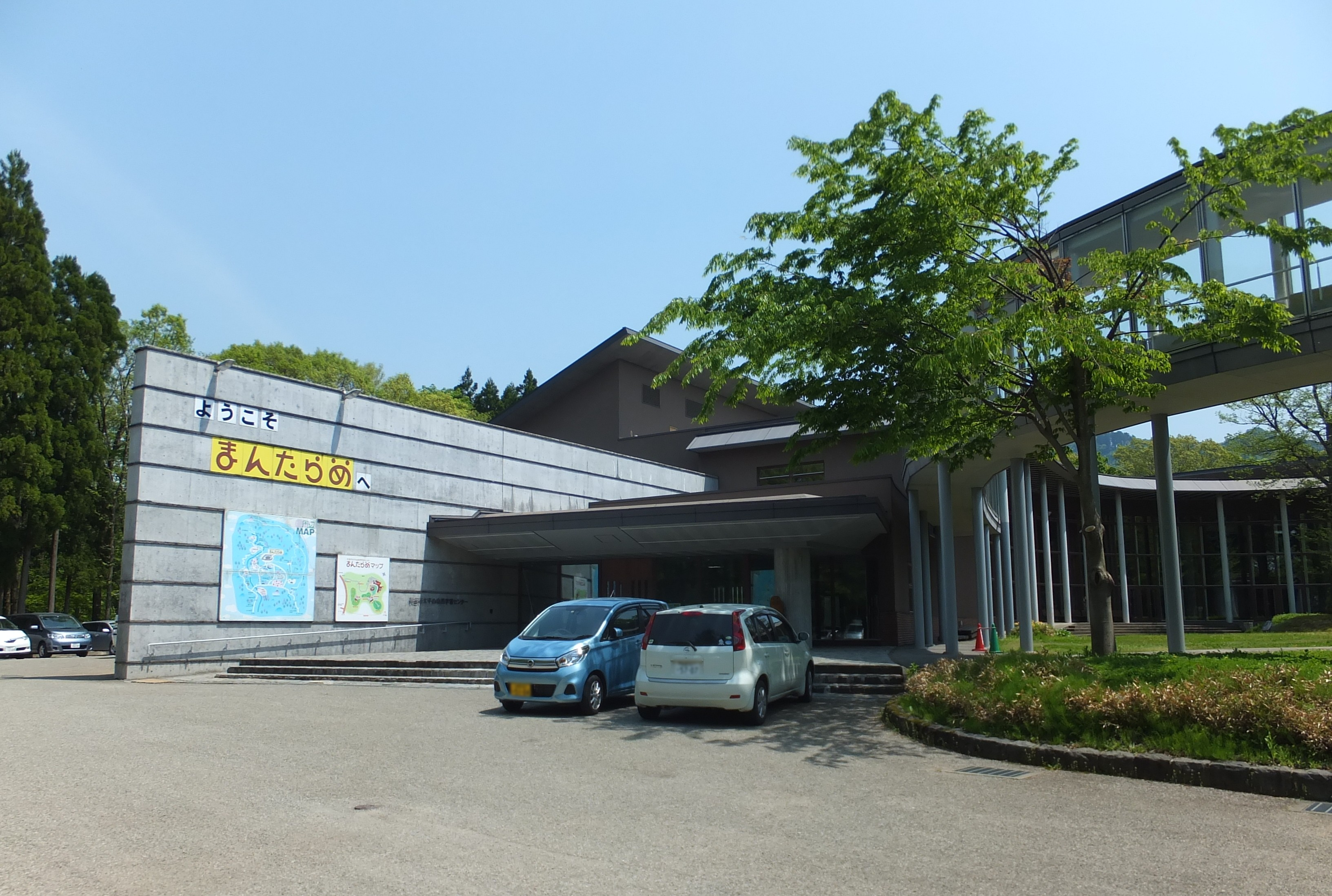 秋田市太平山自然学習センター まんたらめ